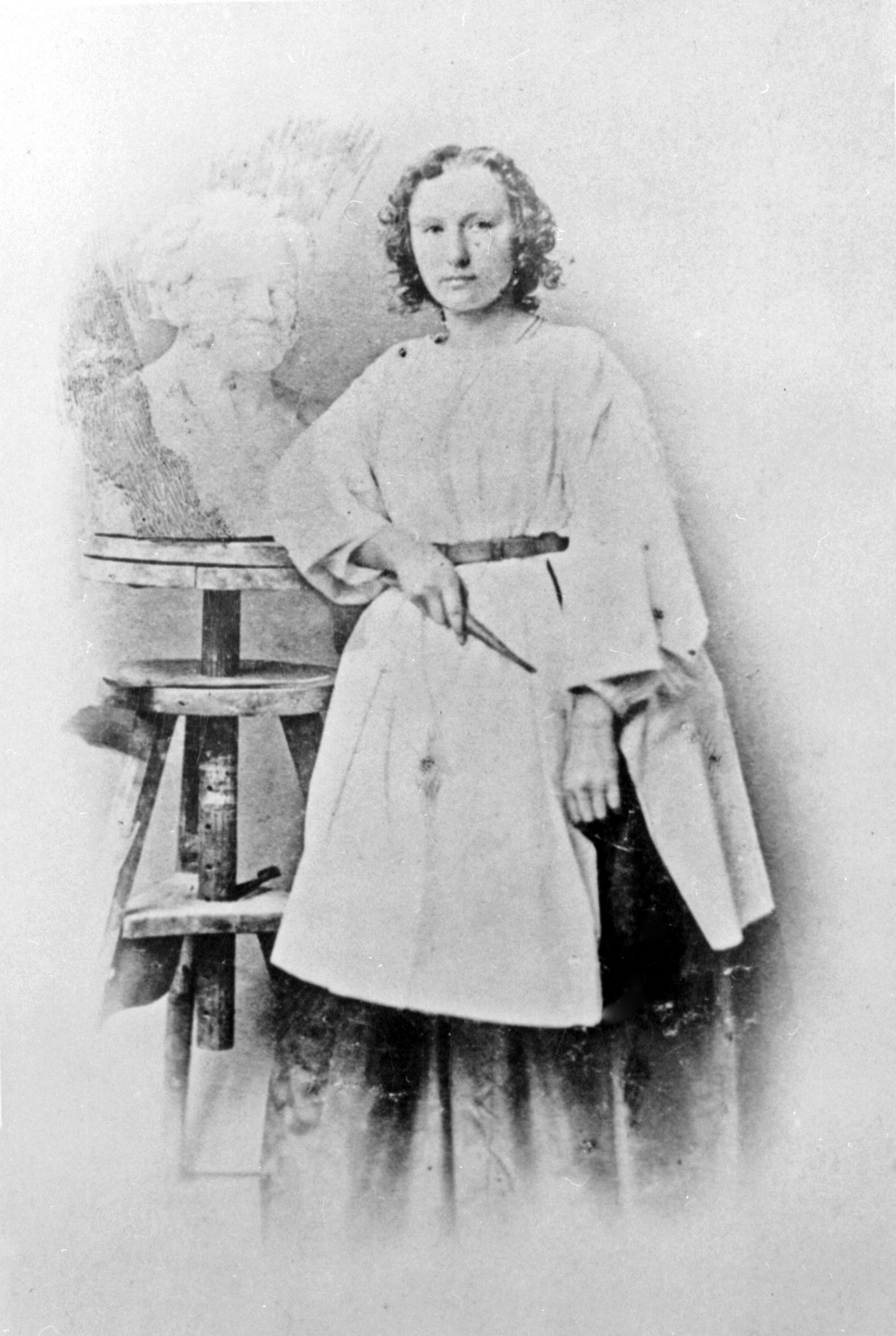 Diese Fotografie zeigt die noch junge Bildhauerin Elisabeth Ney in ihrem Atelier vor der Büste, die sie im Jahr 1859 von Arthur Schopenhauer schuf.